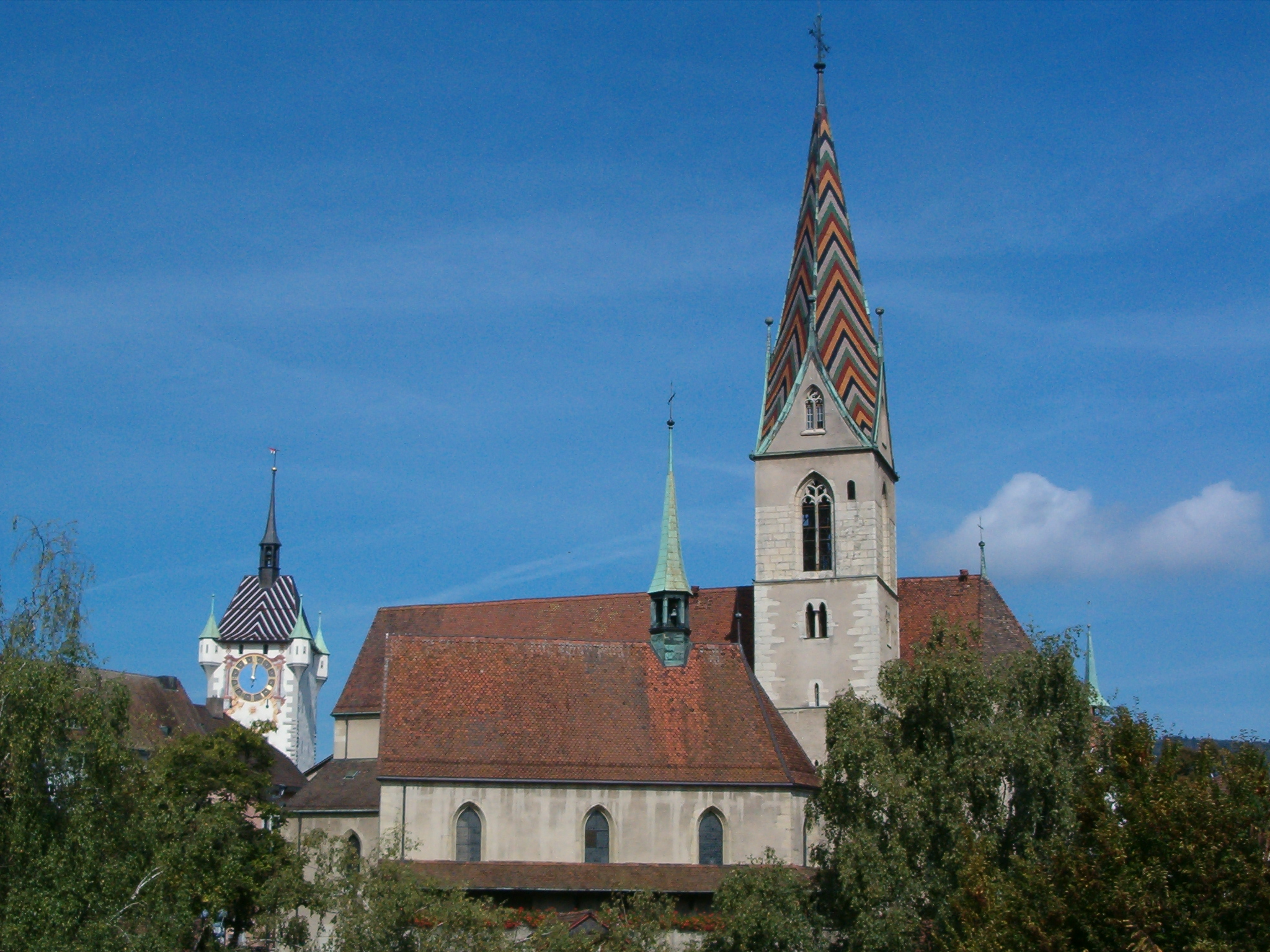 Katholische Stadtkirche mit Sebastianskapelle und Stadtturm